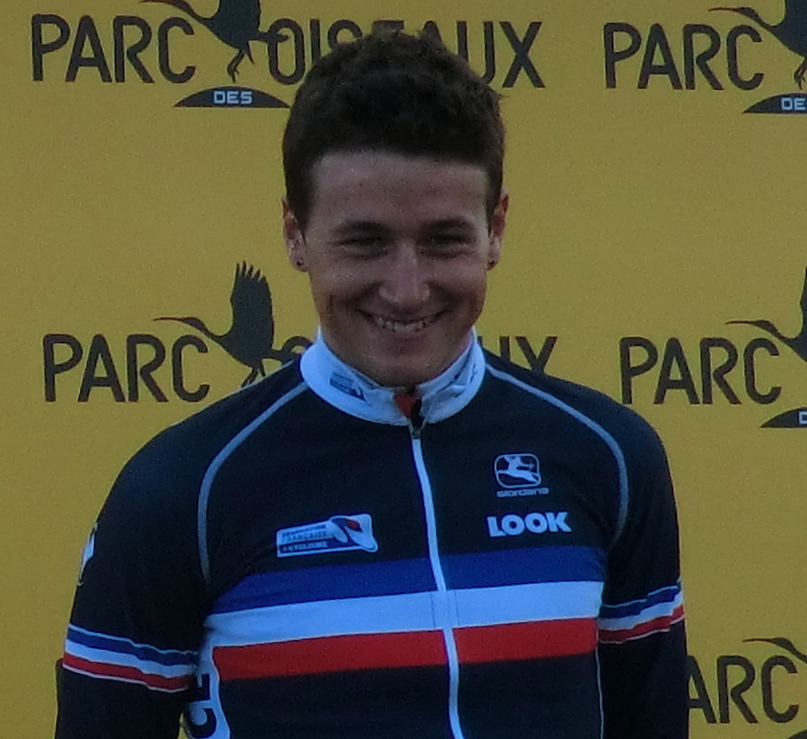 Podiums de la seconde étape du Tour de l'Avenir 2013 à Saint-Vulbas.